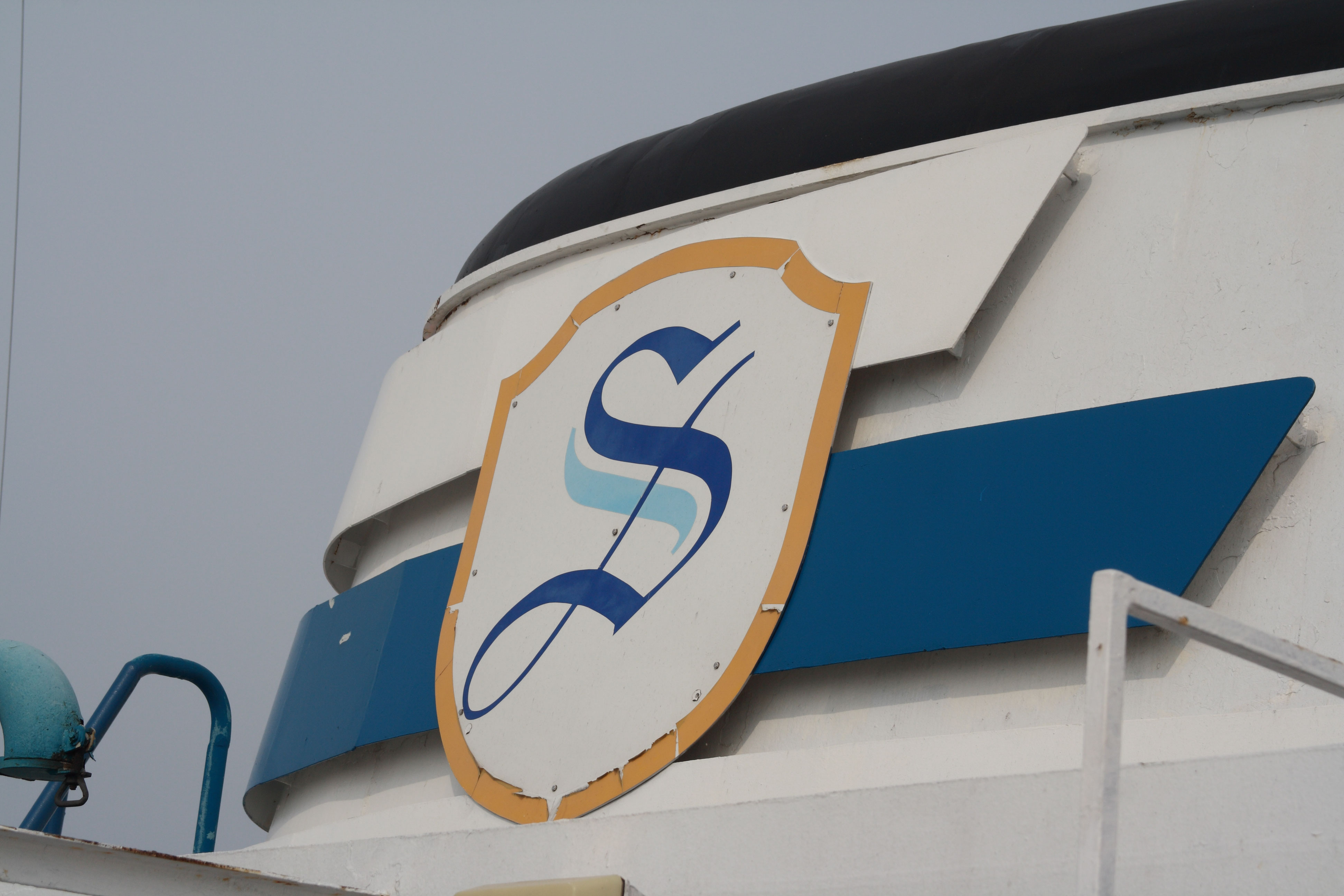 Saaremaa Laevakompanii logo Regulal